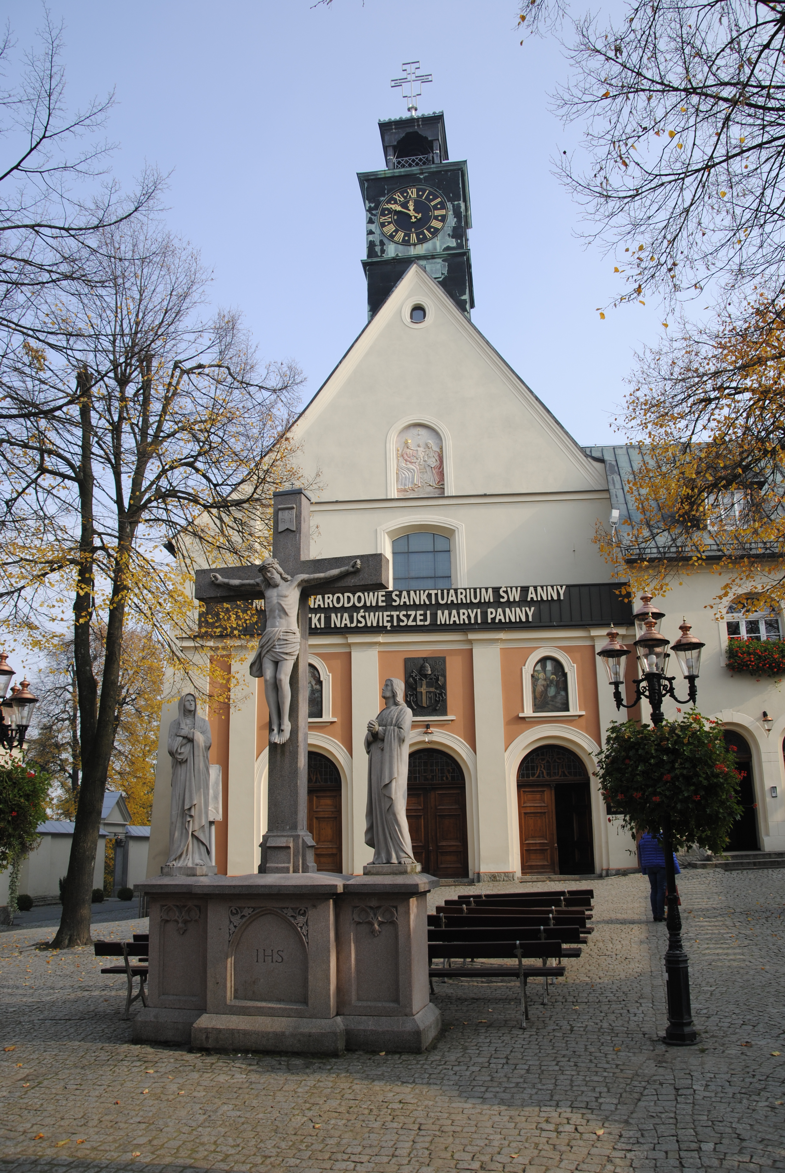 St. Anna Kirche am St. Annaberg in Oberschlesien